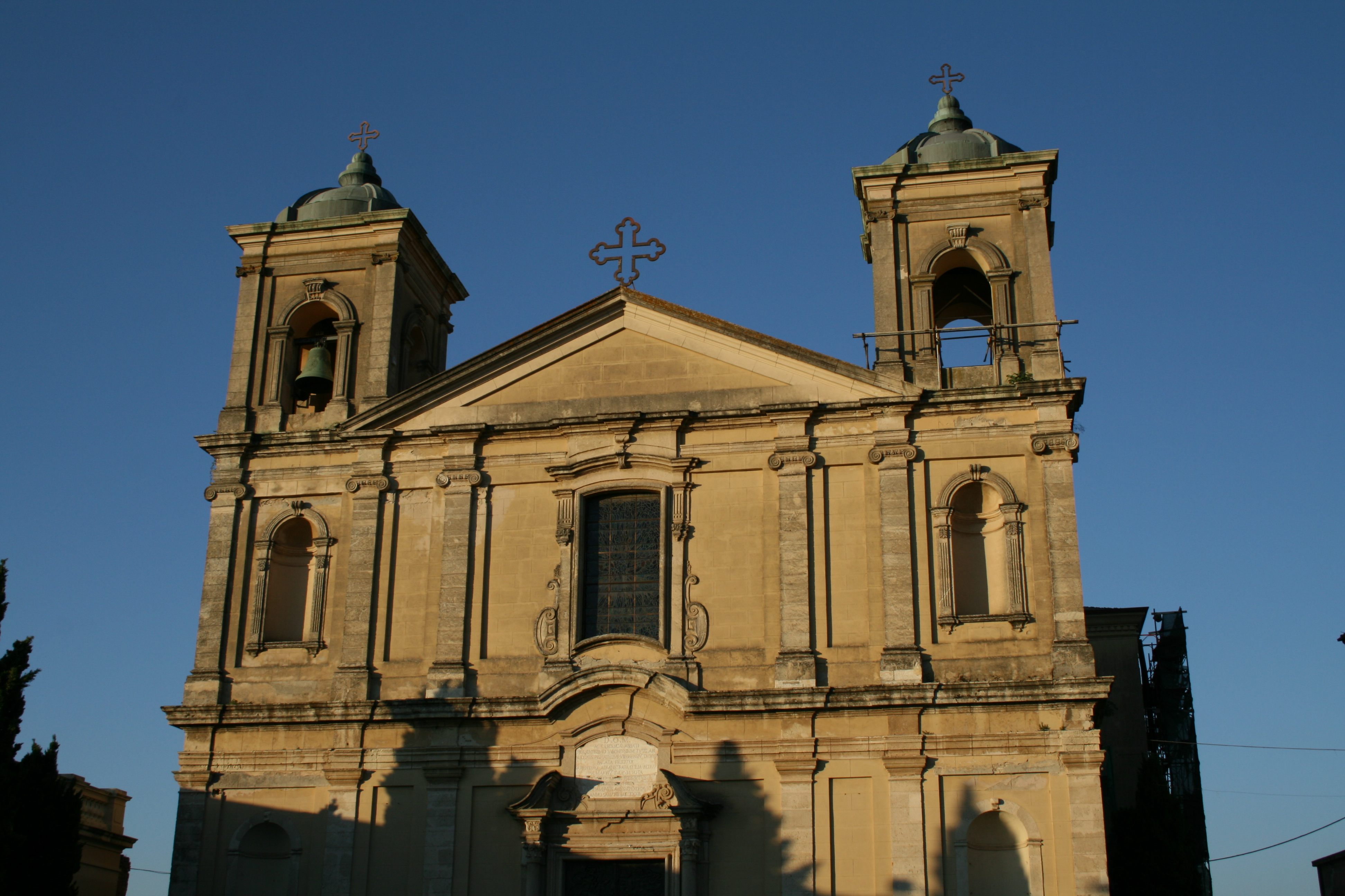 Duomo di Vibo Valentia: Chiesa di Santa Maria Maggiore e San Leoluca